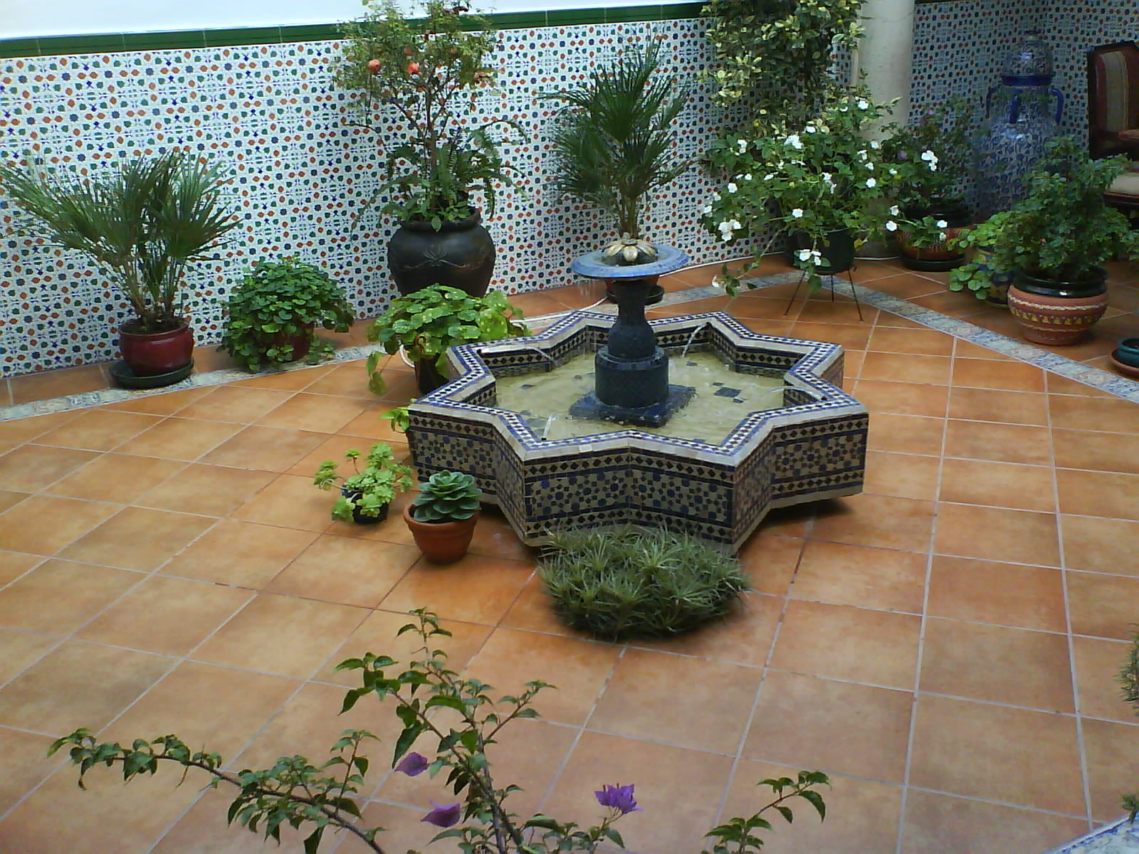 Patio asidonense con fuente. Casa Rural Sidonia, en Medina-Sidonia.